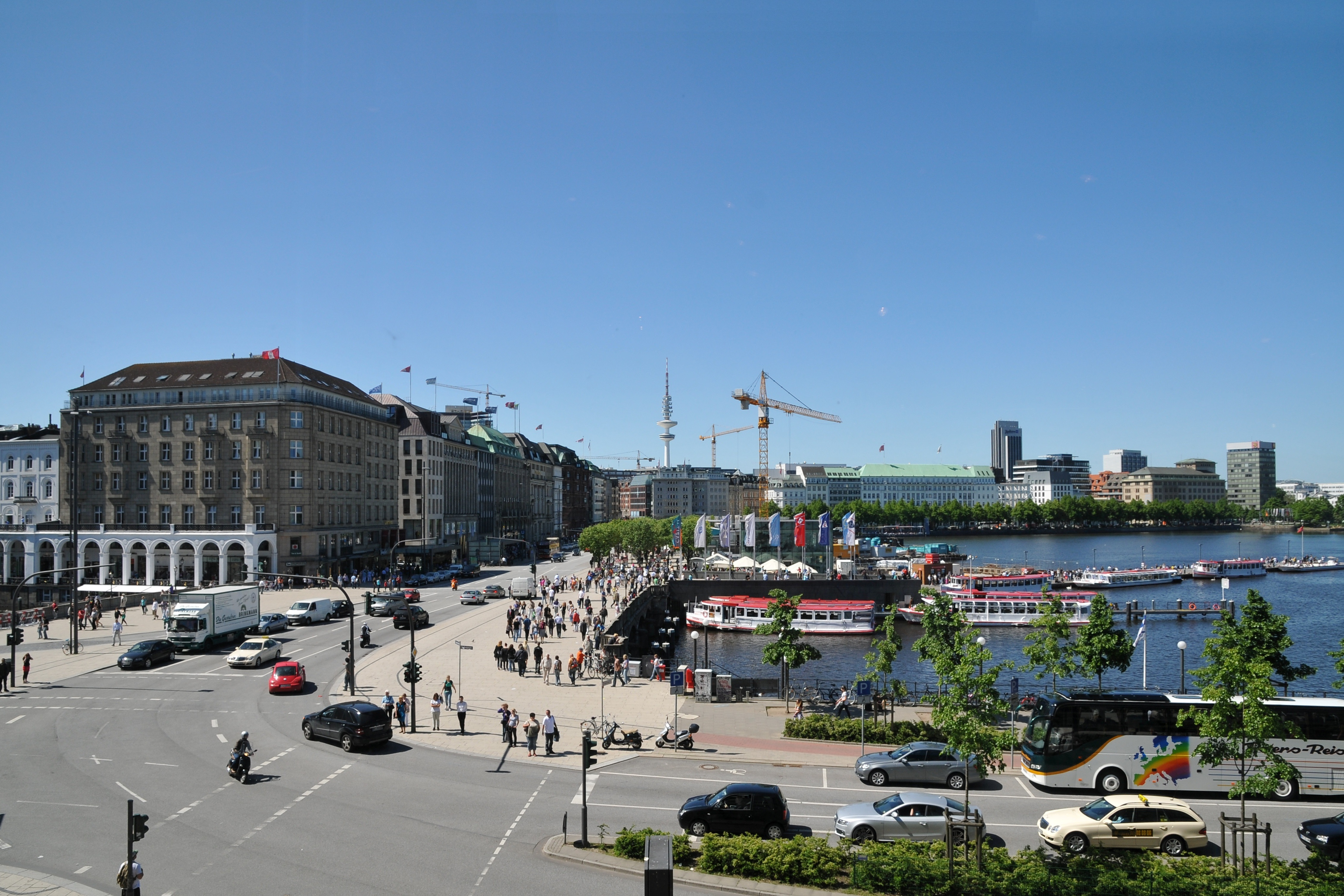 Jungfernstieg 2010